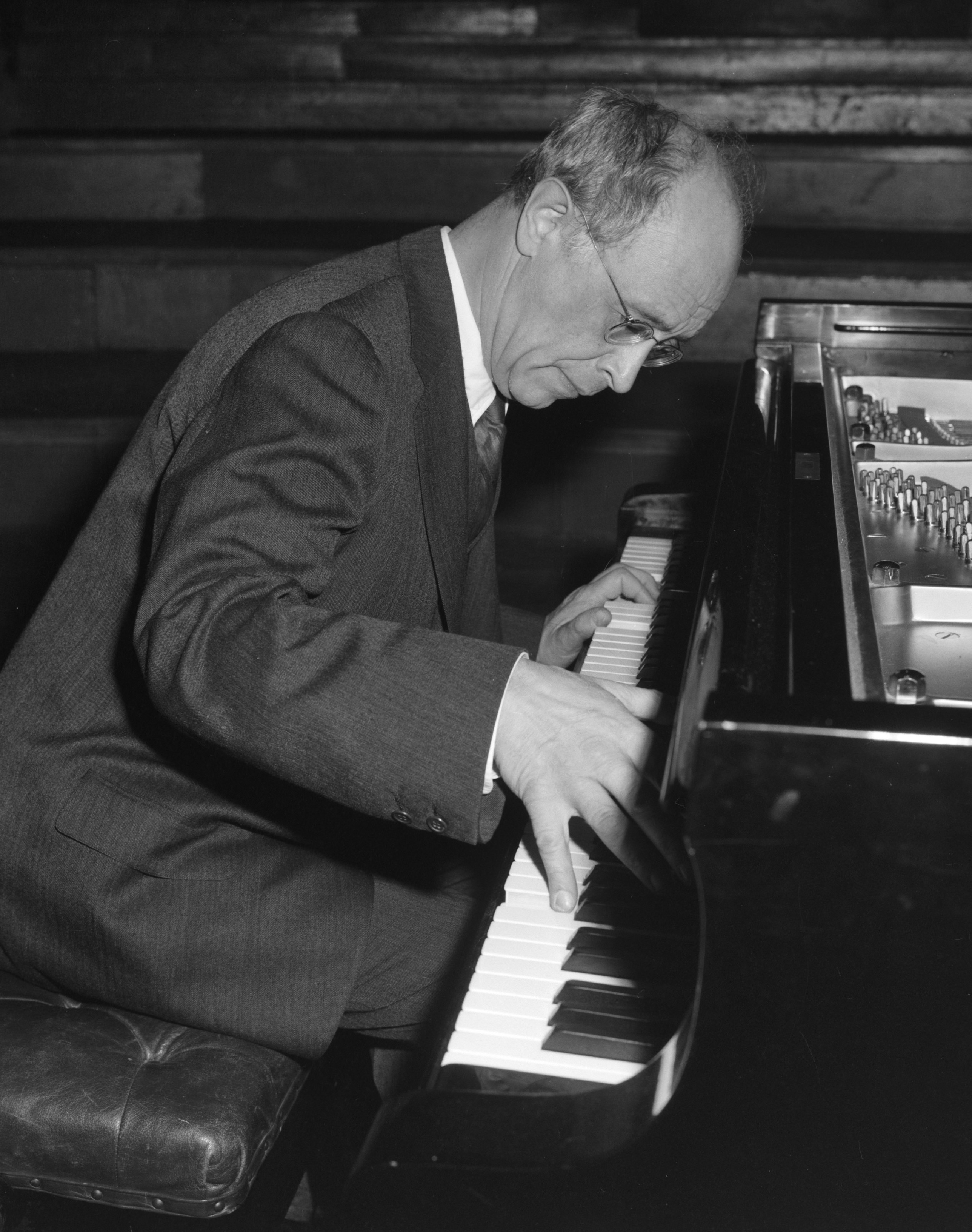 De meesterpianist Rudof Serkin hier tijdens de repetiti in het Concertgebouw